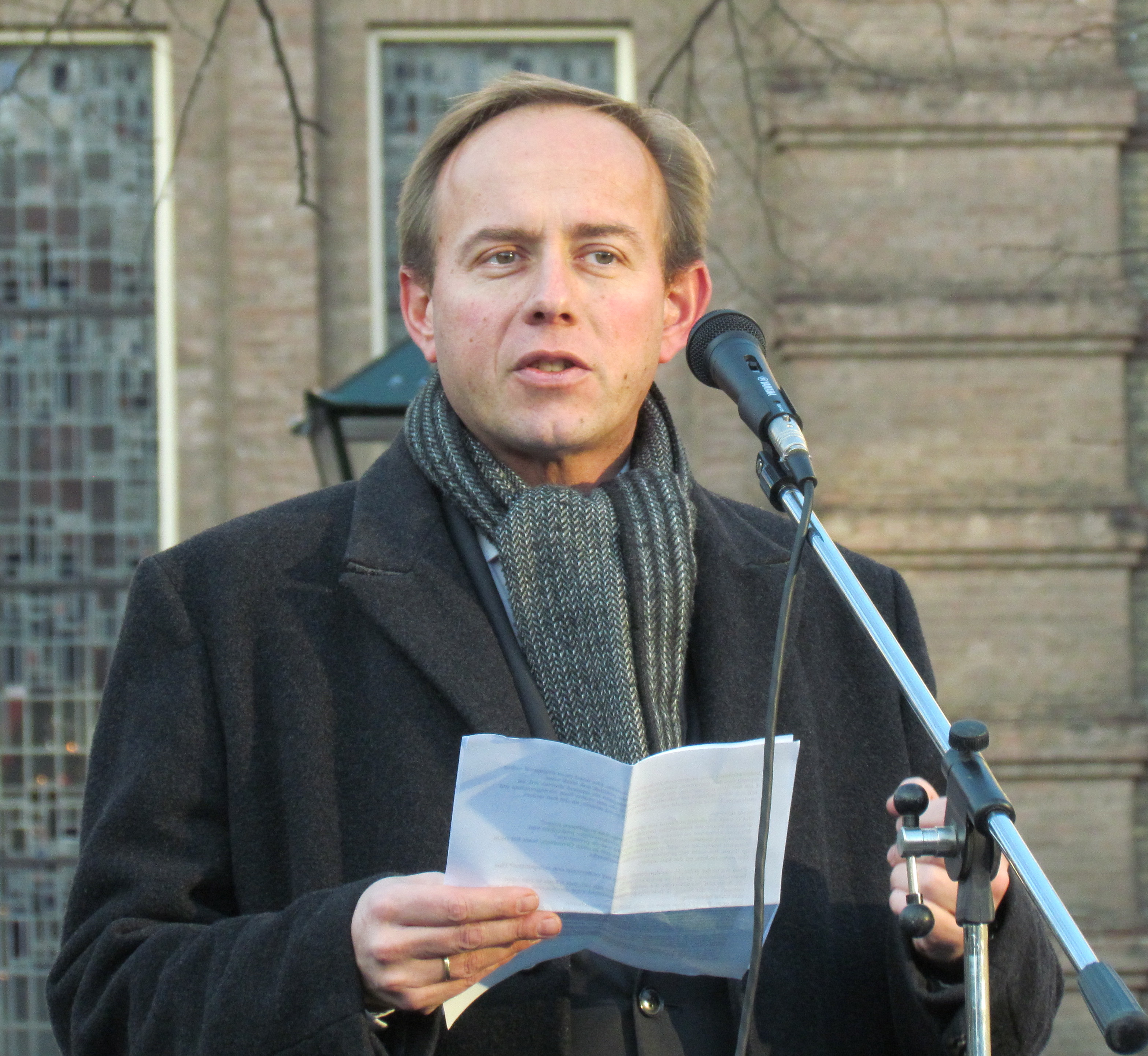 De Nederlandse politicus Kees van der Staaij (leider van de SGP) houdt een toespraak bij de Mars voor het Leven 2011, Den Haag